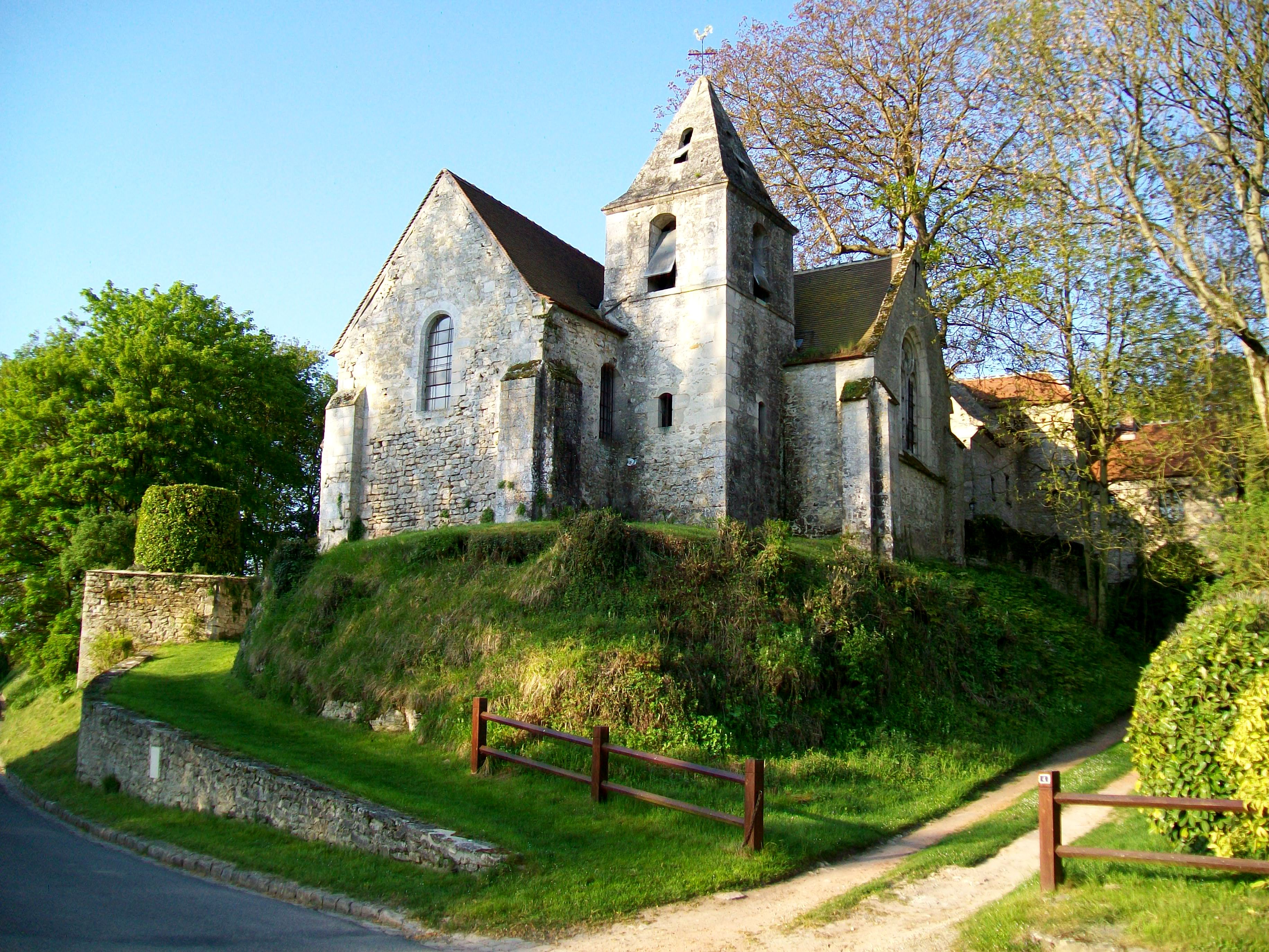 L'église Saint-Georges de Bray, du XIIe siècle, inscrite monuments historiques depuis 1951. Sa situation sur un petit rocher est inhabituelle pour la région, caractérisée par des vastes plaines agricoles.